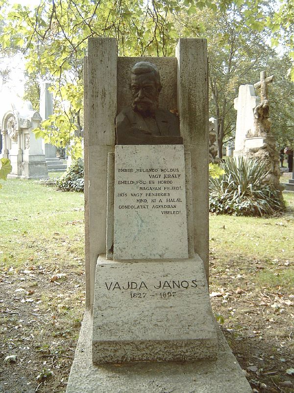 Vajda János sírja Budapesten. Kerepesi temető: 34/1-1-32. A síremlék Somló Sári (1886–1970) alkotása (1908, felállítva: 1915)